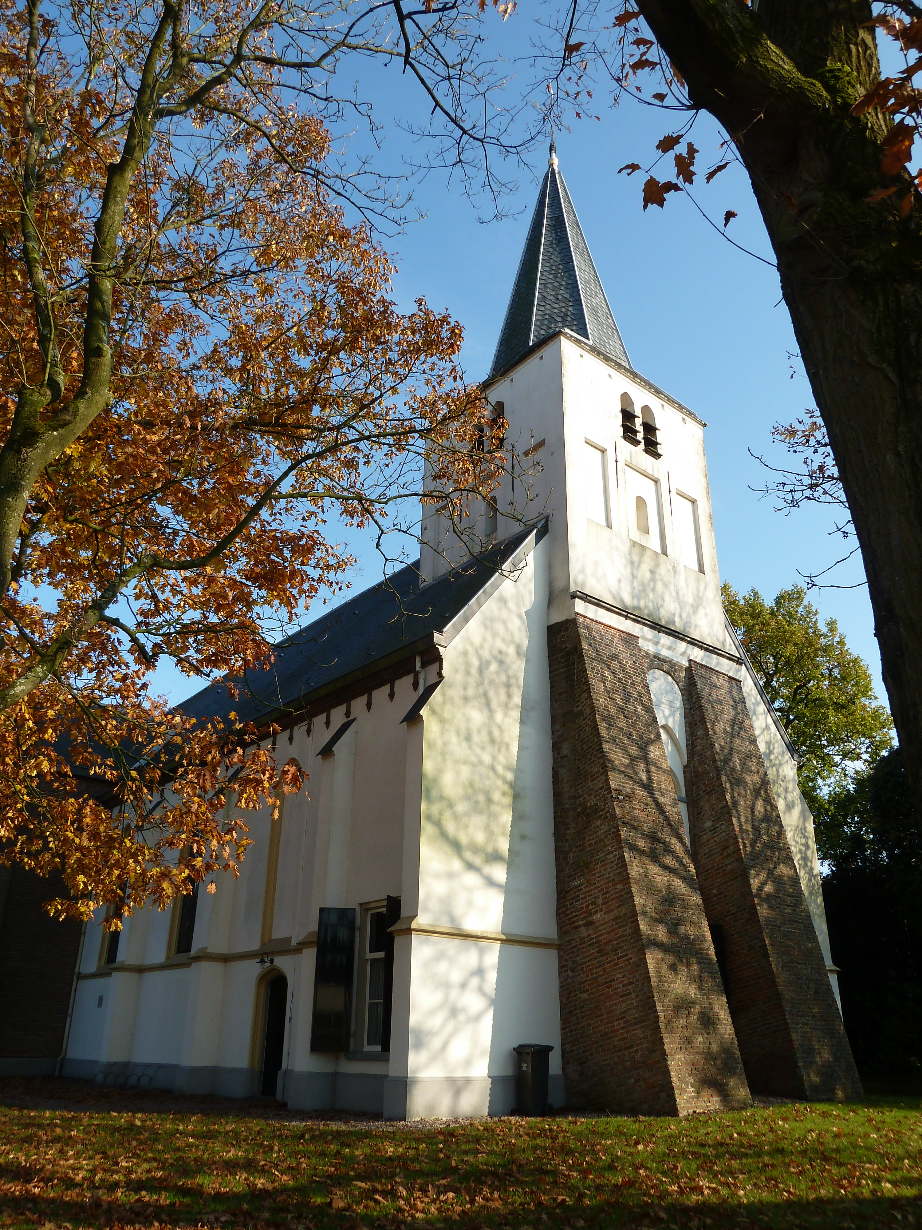 Sint-Lambertuskerk, Kerk-Avezaath, Nederland